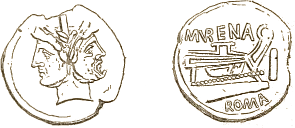 Romeins as met een gelauwerd Janushoofd aan de voorzijde en een voorsteven met in de legende MVRENA en ROMA.